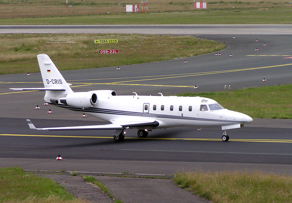 Israel Aircraft Industries 1125 Astra SPX (D-CRIS) in Düsseldorf (EDDL/DUS)